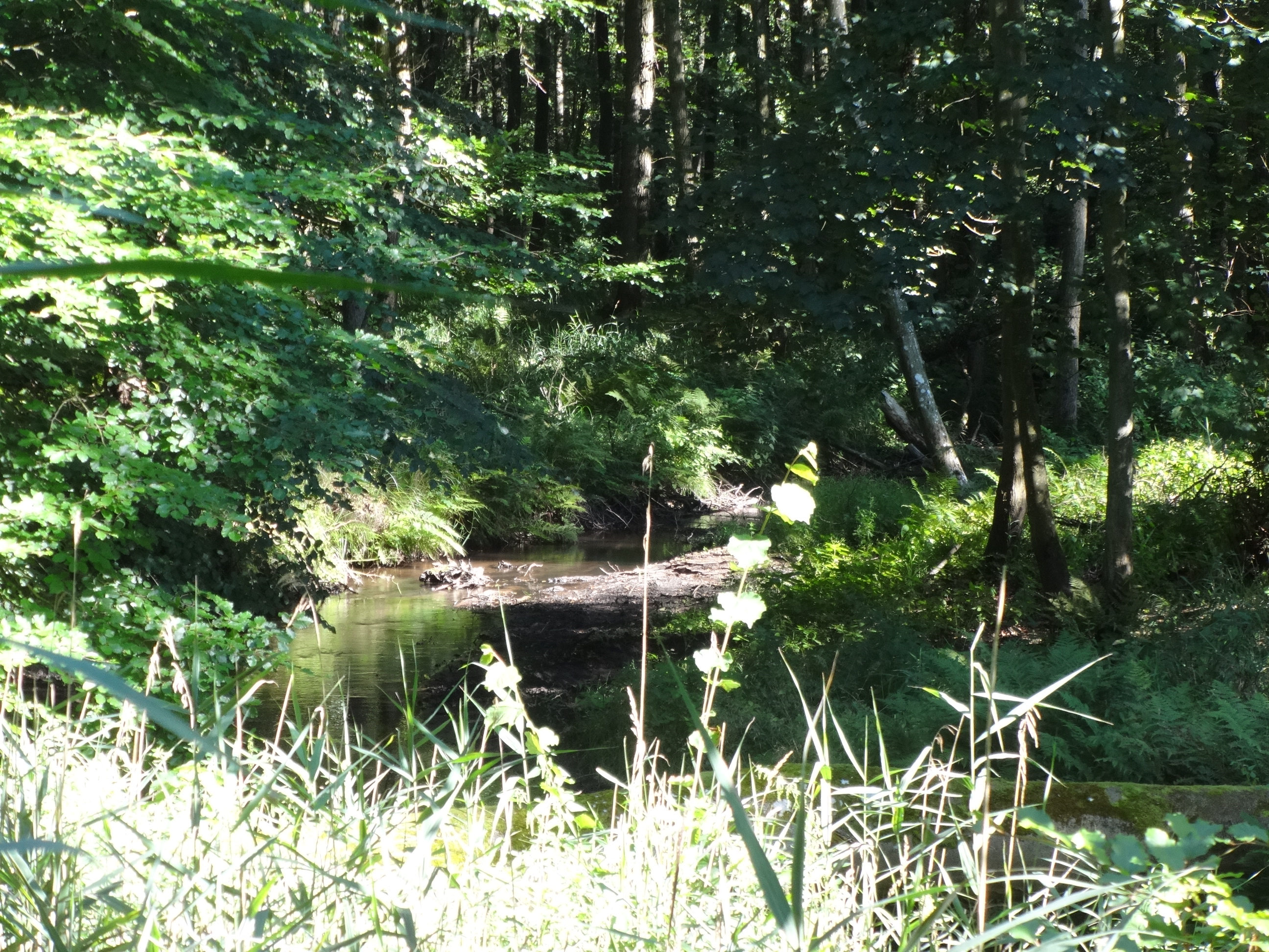 Brebowbach im Waldgebiet "Kleiner Hagen" südlich von Buddenhagen, Vorpommern-Greifswald